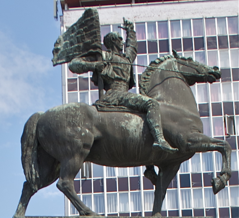 Моравац - Споменик ослободиоцима Ниша